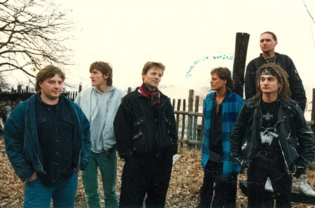 A Vágtázó Halottkémek tagjai: Ipacs László, Sidoó Attila (Kisfidó), Grandpierre Atilla, Soós Lajos (Szónusz), Németh László (Fritz), Balatoni Endre (Boli). Helyszín: Pilis.